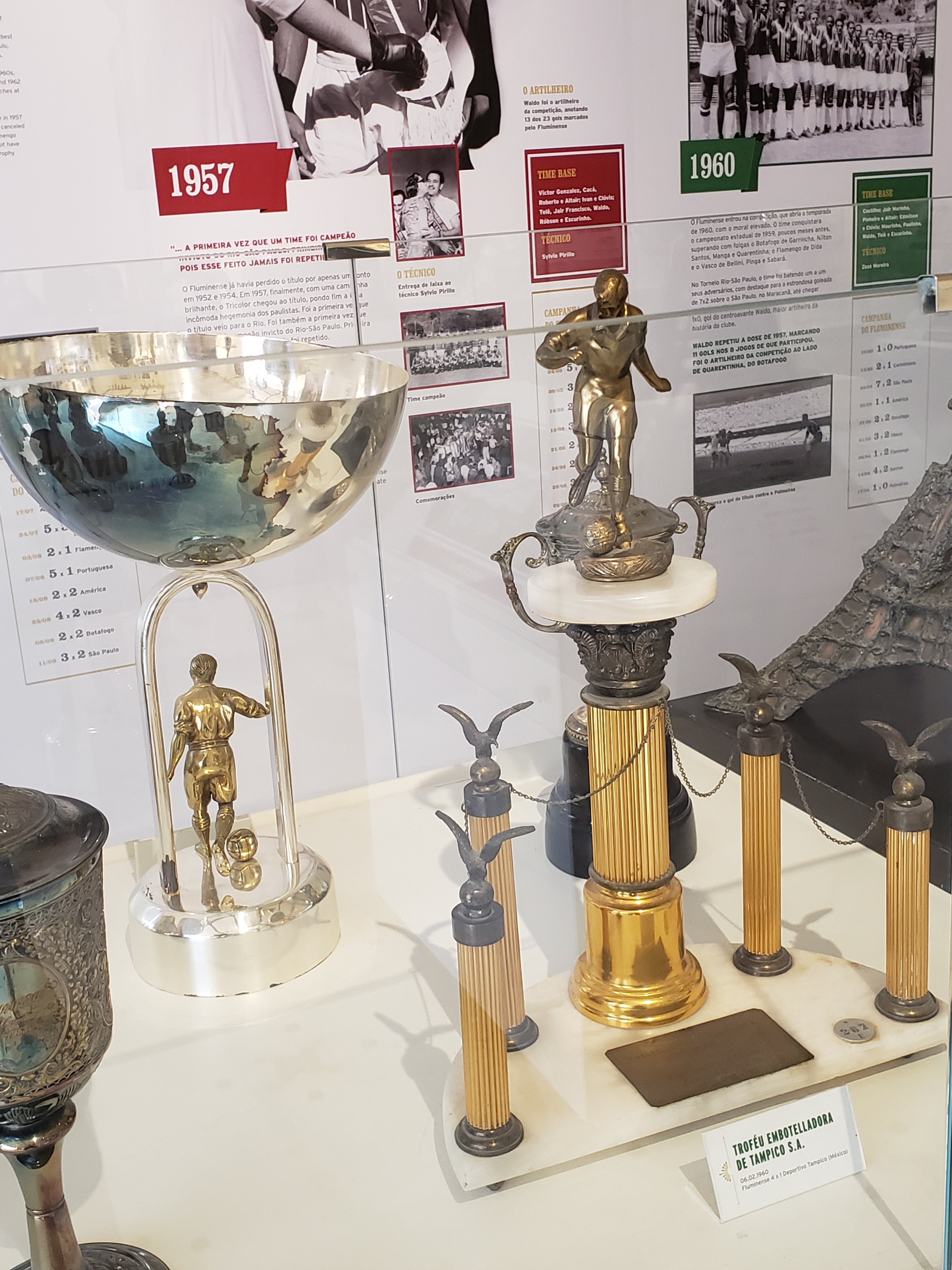 Taça Embotelladora de Tampico SA conquistada pelo Fluminense contra o Deportivo Tampico, no México, em 1960.